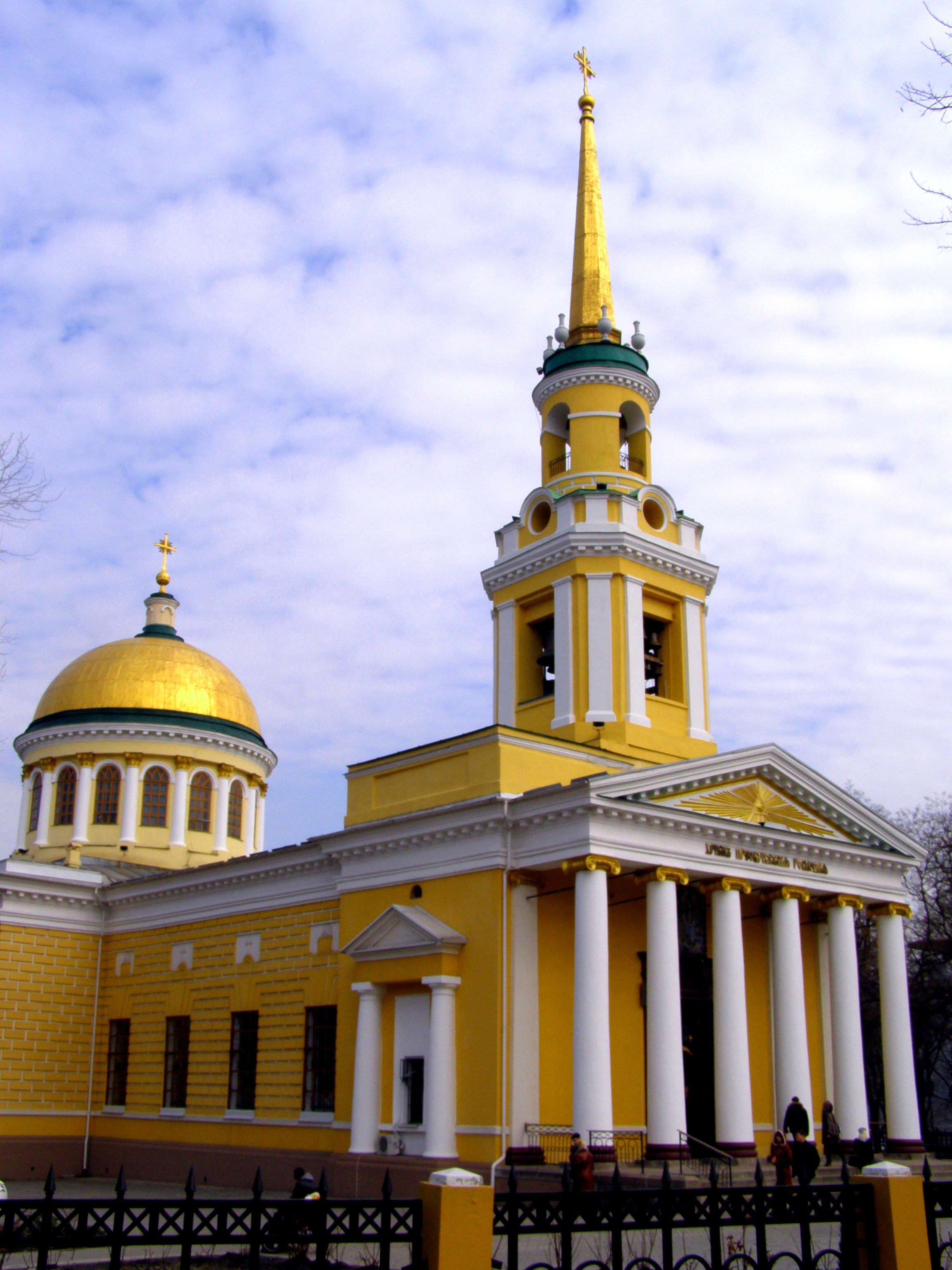 Собор в Днепропетровске